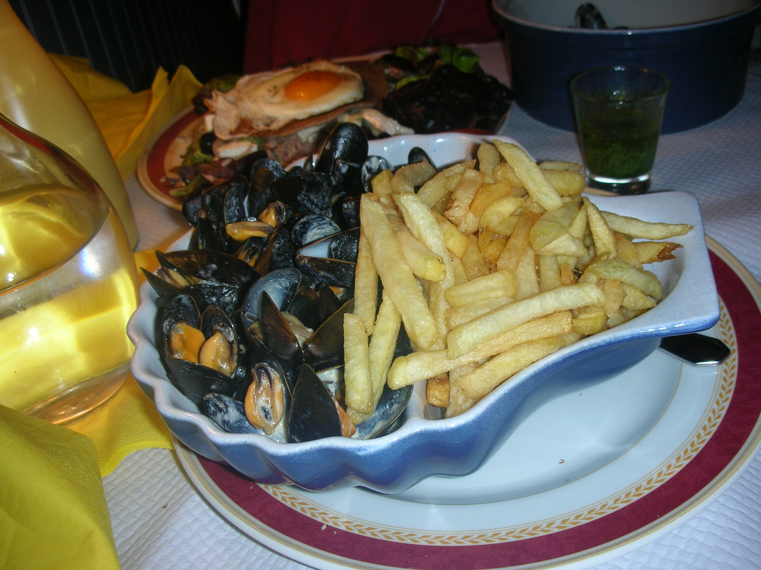 Bretainiako eta Normandiako jaki tipikoaMoules frites